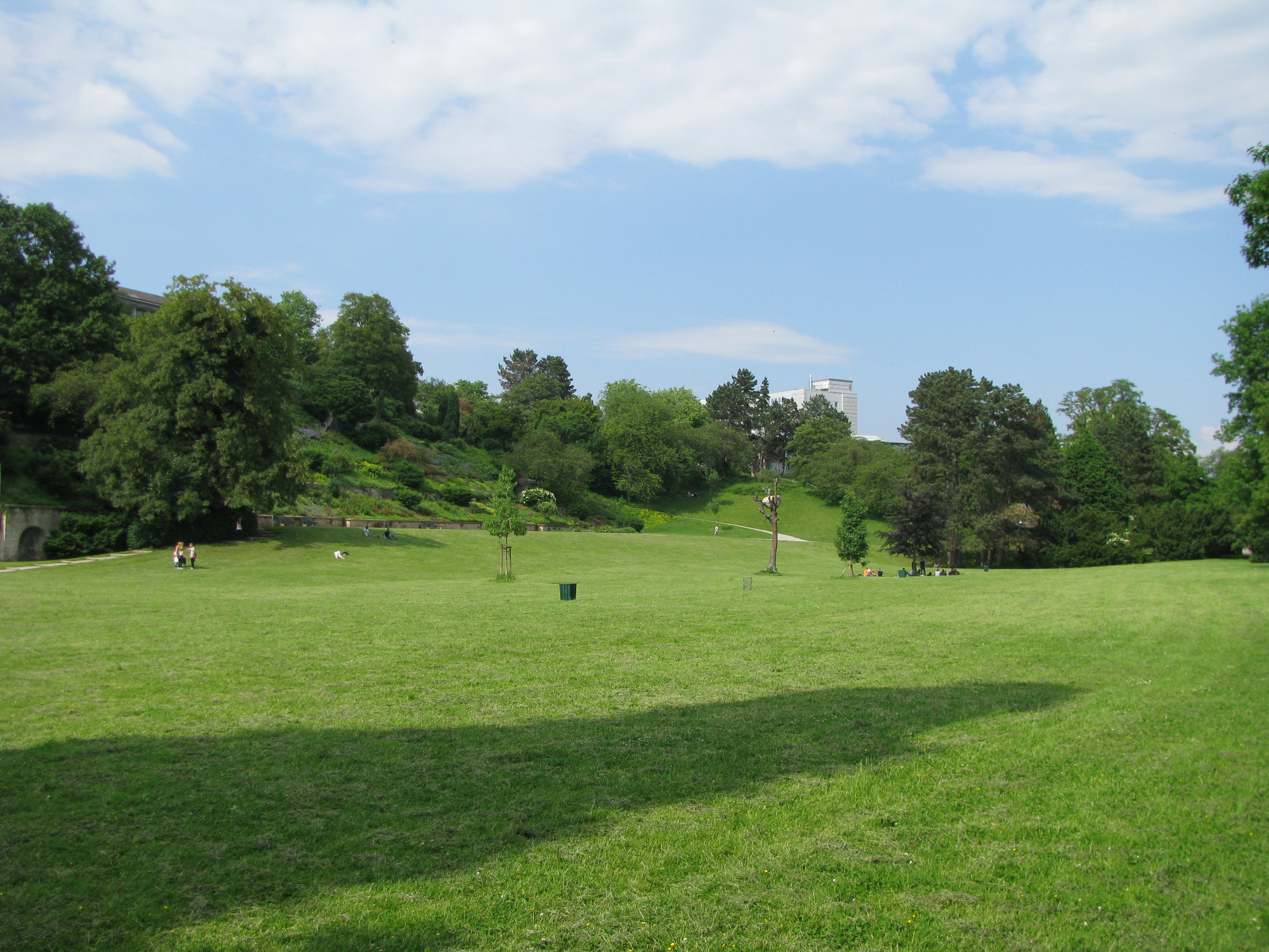 die sogenannte "Kifferwiese" als Teil des LSG Stadt Kassel, in der Mitte steht der Penone-Baum von der documenta 13, an der linken Seite liegt der Rosenhang